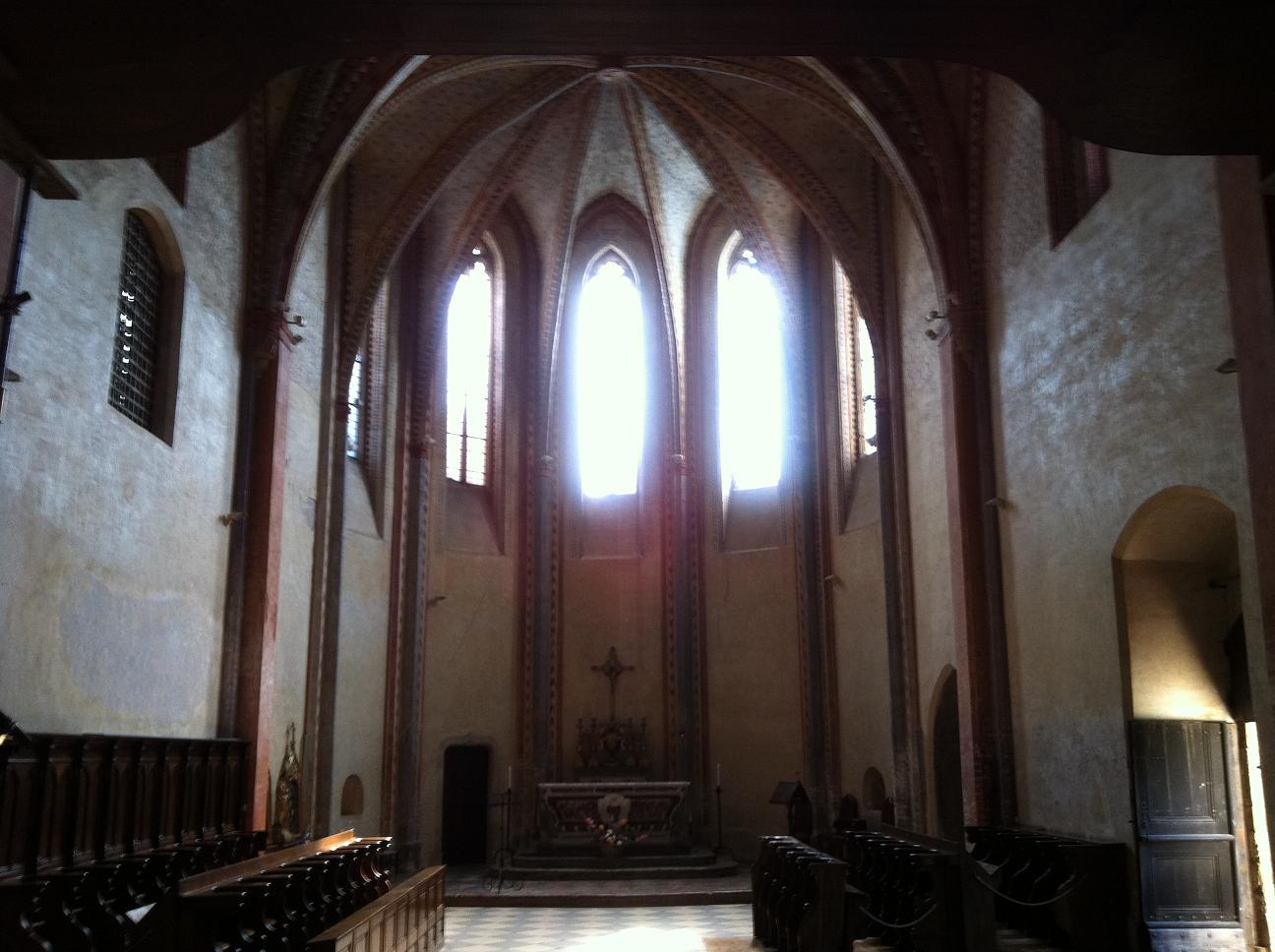 L'église de l'abbaye Sainte-Marie de Boulaur (XIIe siècle)